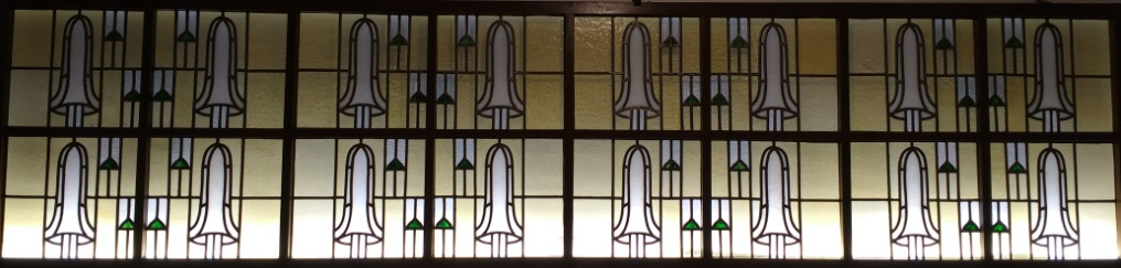 Vitrall del rebedor del primer pis de la Casa Ensesa Autoria: Rafael Masó i Valentí Material: Vidre catedral, fusta i plom. Mides: 75x322x4cm Datació: 1915 MHG